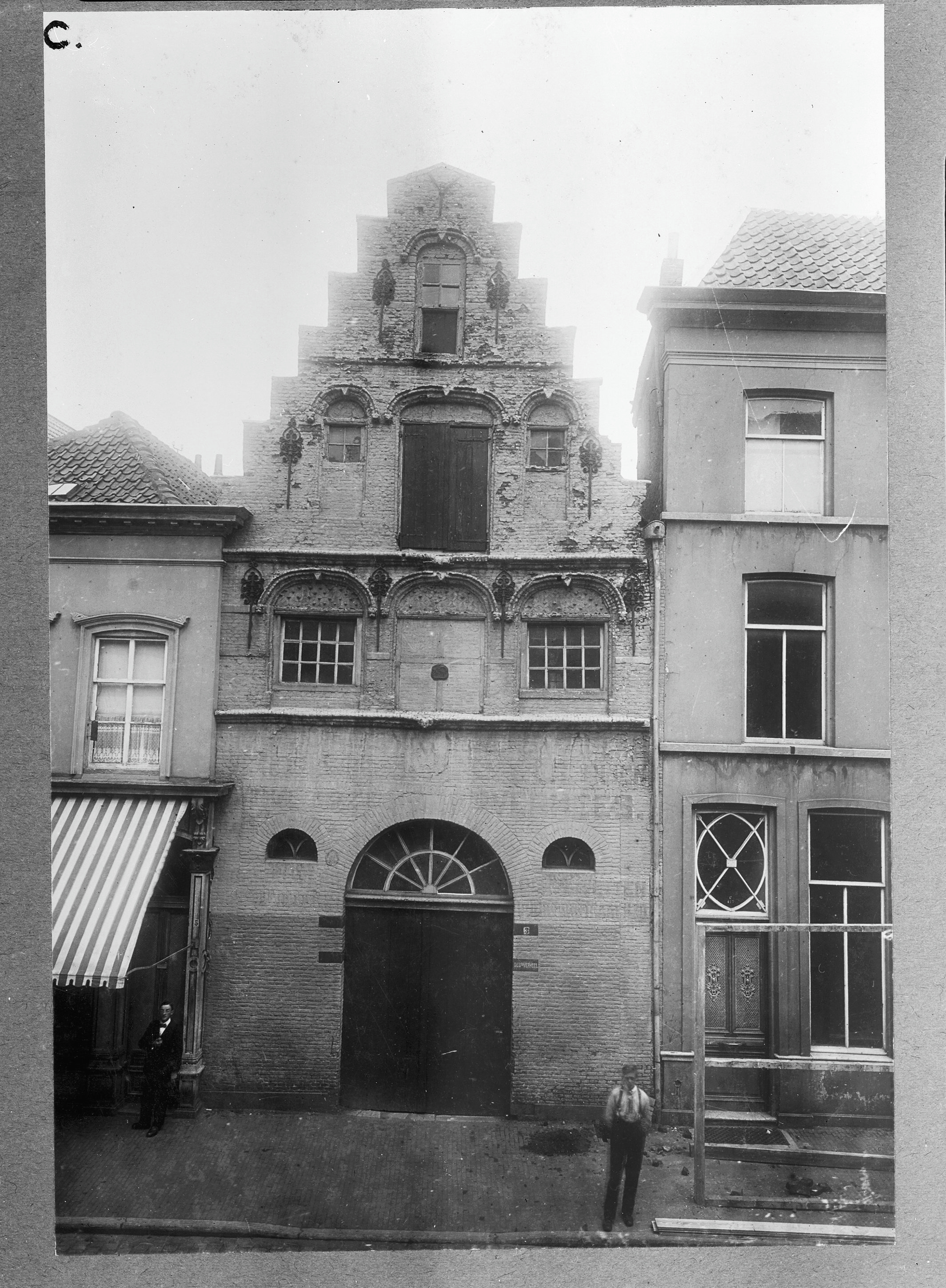 De Gulden Hopsack: Huis "De Gulden Hopsack", voorgevel